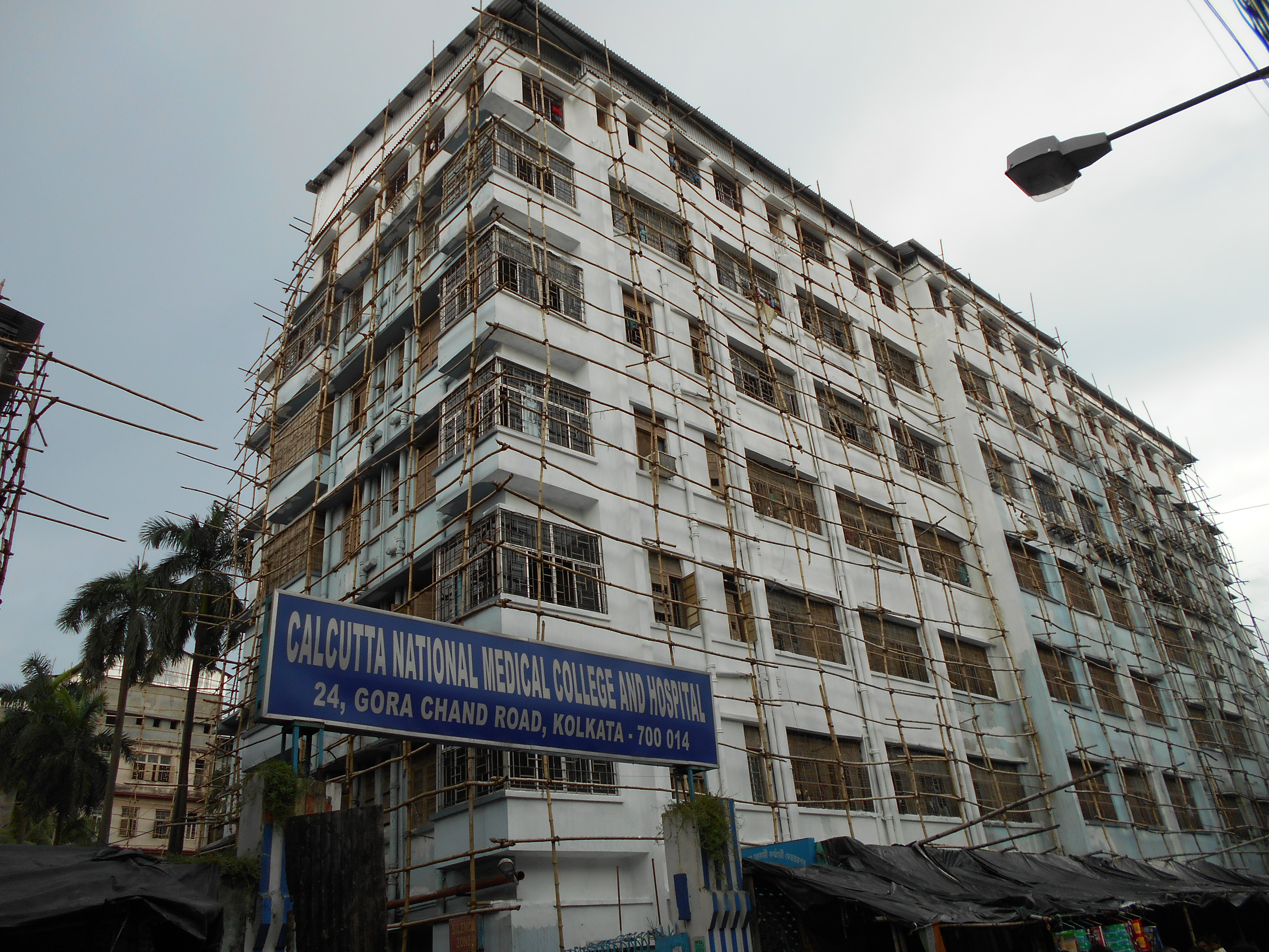 Calcutta National Medical College and Hospital